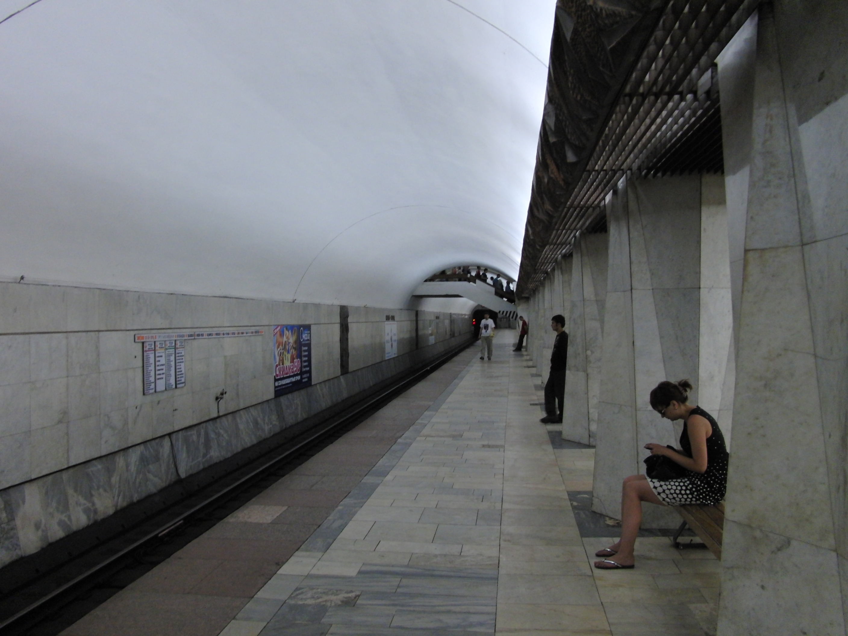 Kitay-gorod (Китай-город)